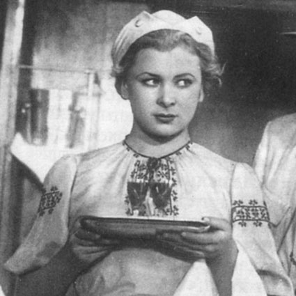 Валентина Серова в фильме Константина Юдина «Девушка с характером»